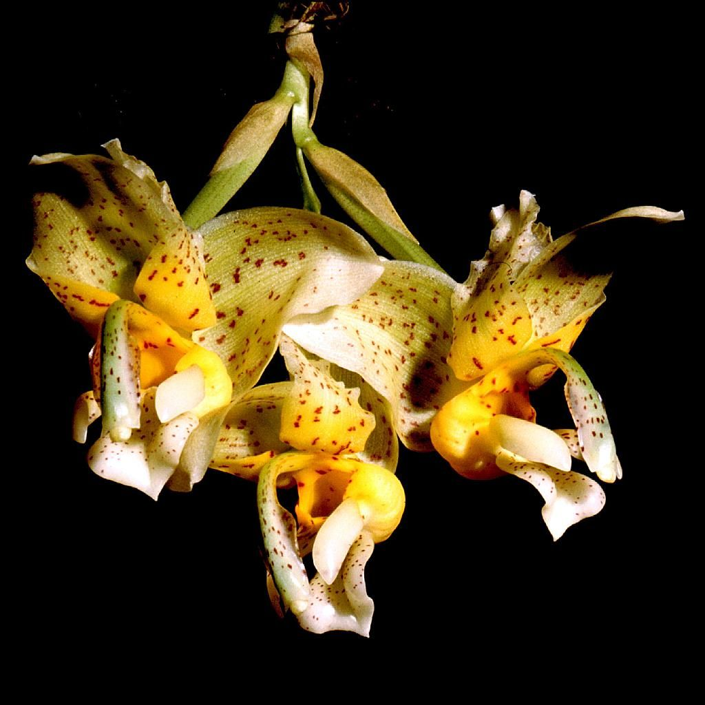 Stanhopea radiosa